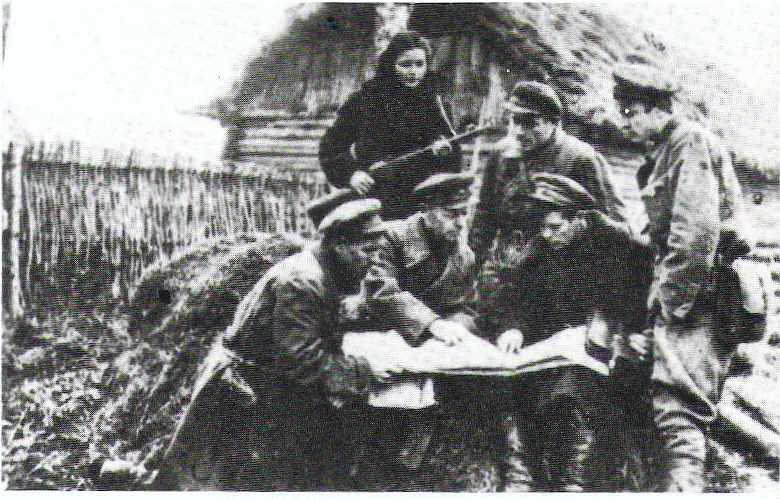 Gruppo di partigiani sovietici preparano un azione